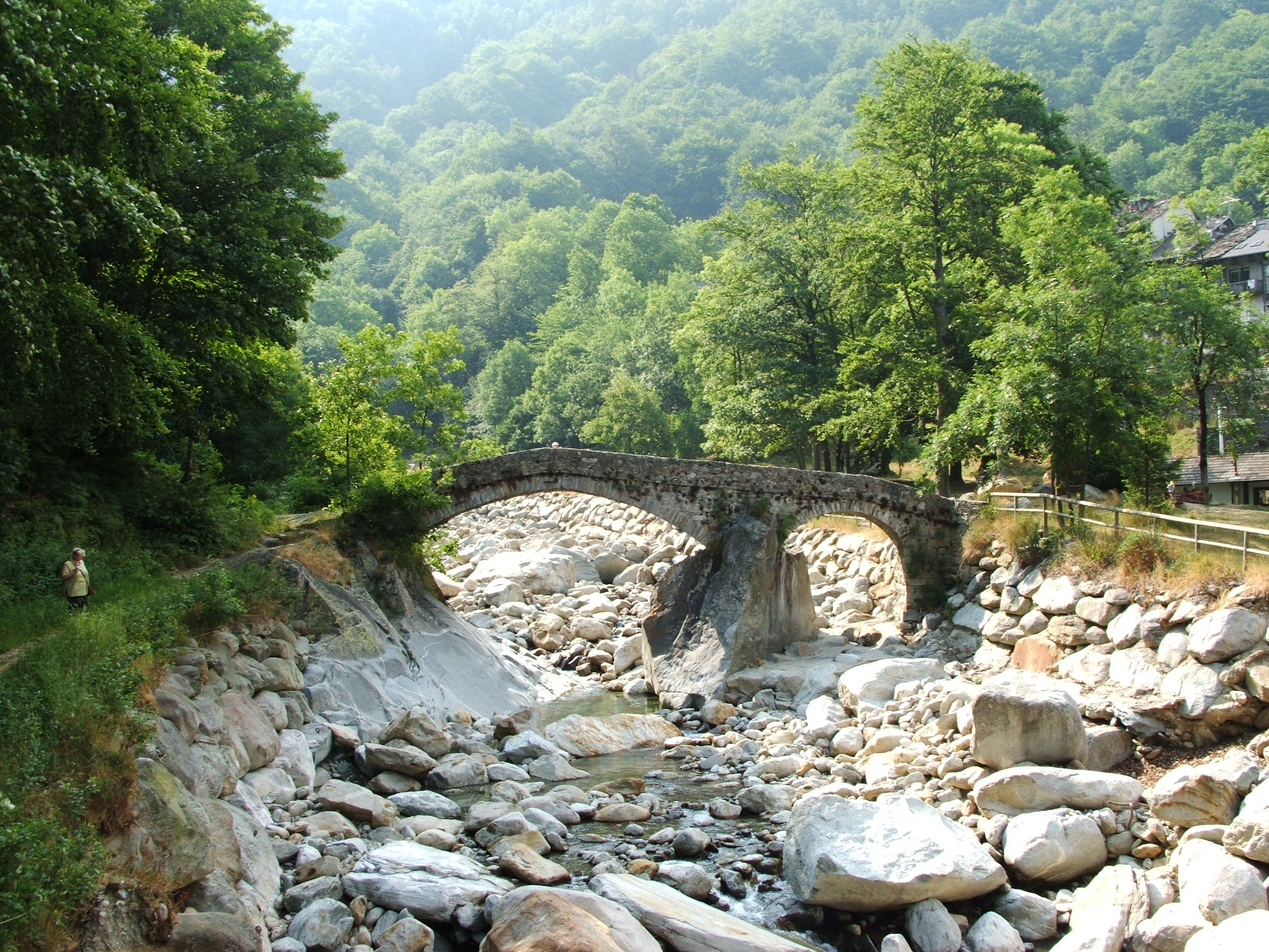 Piedicavallo, comune della Valle Cervo, provincia di Biella (Piemonte, Italia)